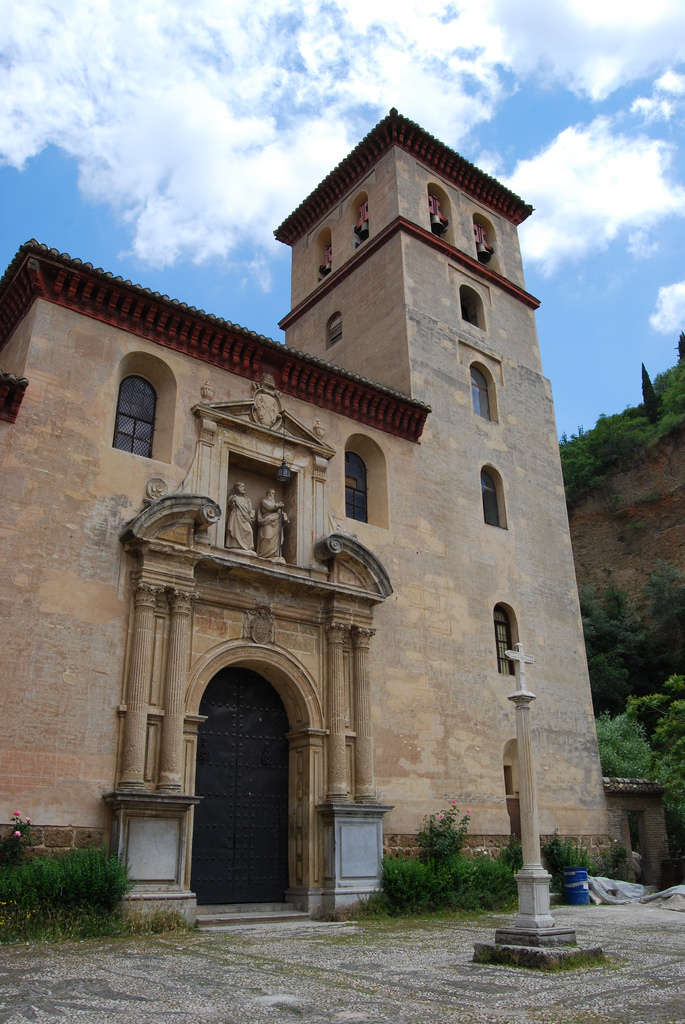 Portada de la iglesia de San Pedro y San Pablo situada en Carrera del Darro (paseo de los tristes) en Granada (España). View of the front of the San Pedro y San Pablo church. Carrera del Darro street in Granada (Spain)